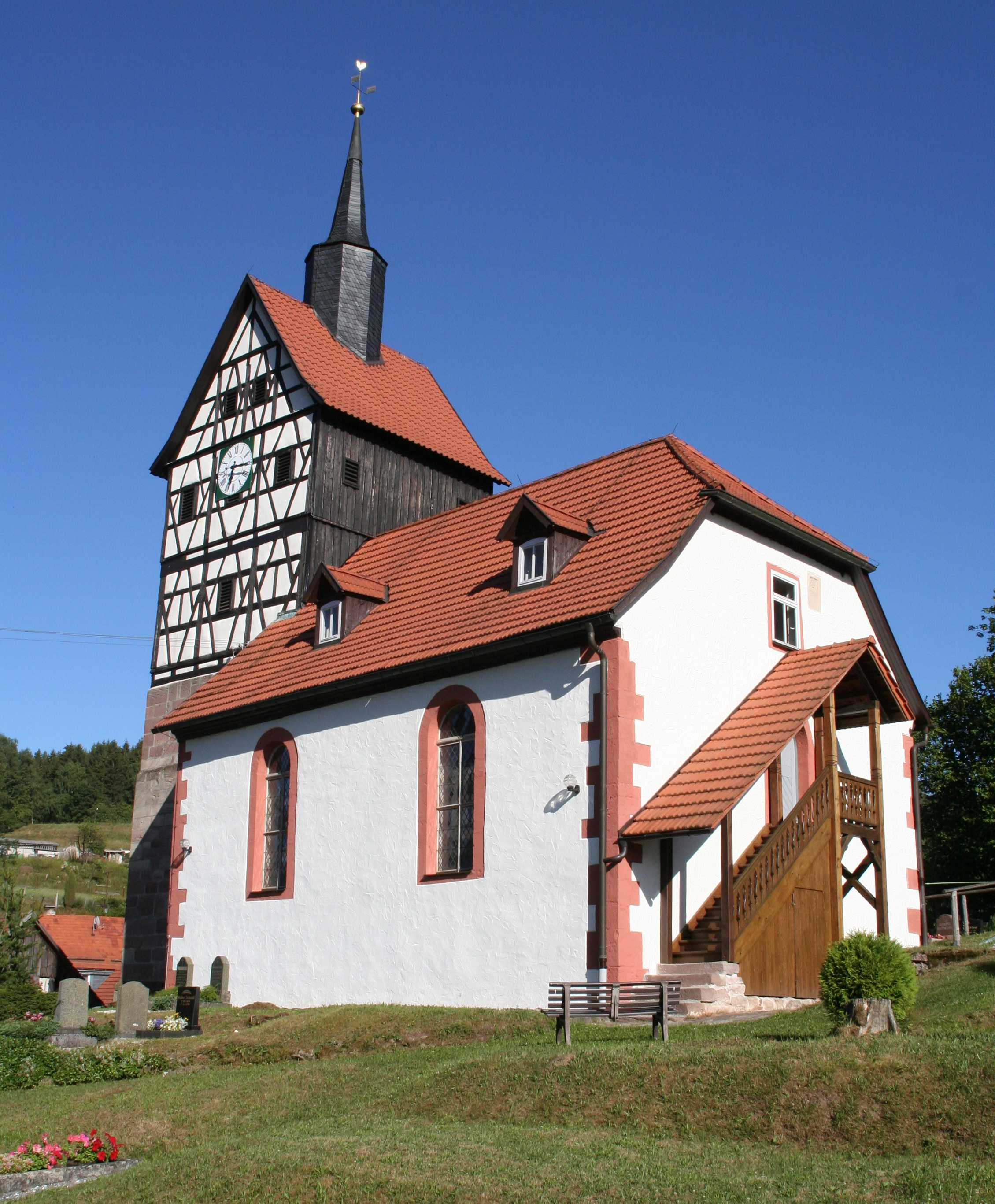 ev. Kirche Ebertshausenevangelische Kirche in Ebertshausen, Ortsteil von Benshausen Landkreis Schmalkalden-Meiningen